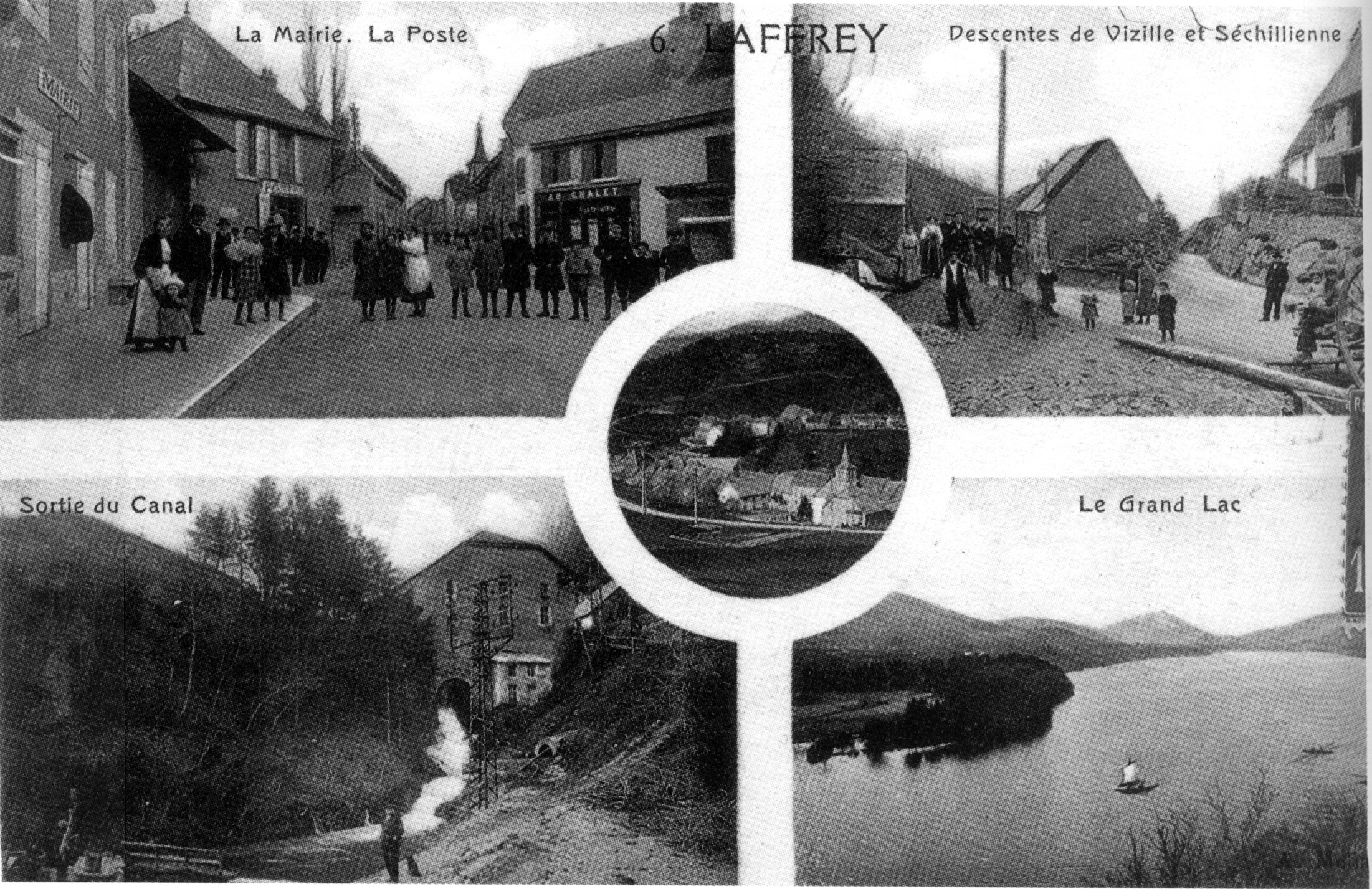 Laffrey, carte postale datant du 1910 : la mairie, la poste, descentes de Vizille et Séchillienne, sortie du canal, le Grand Lac.